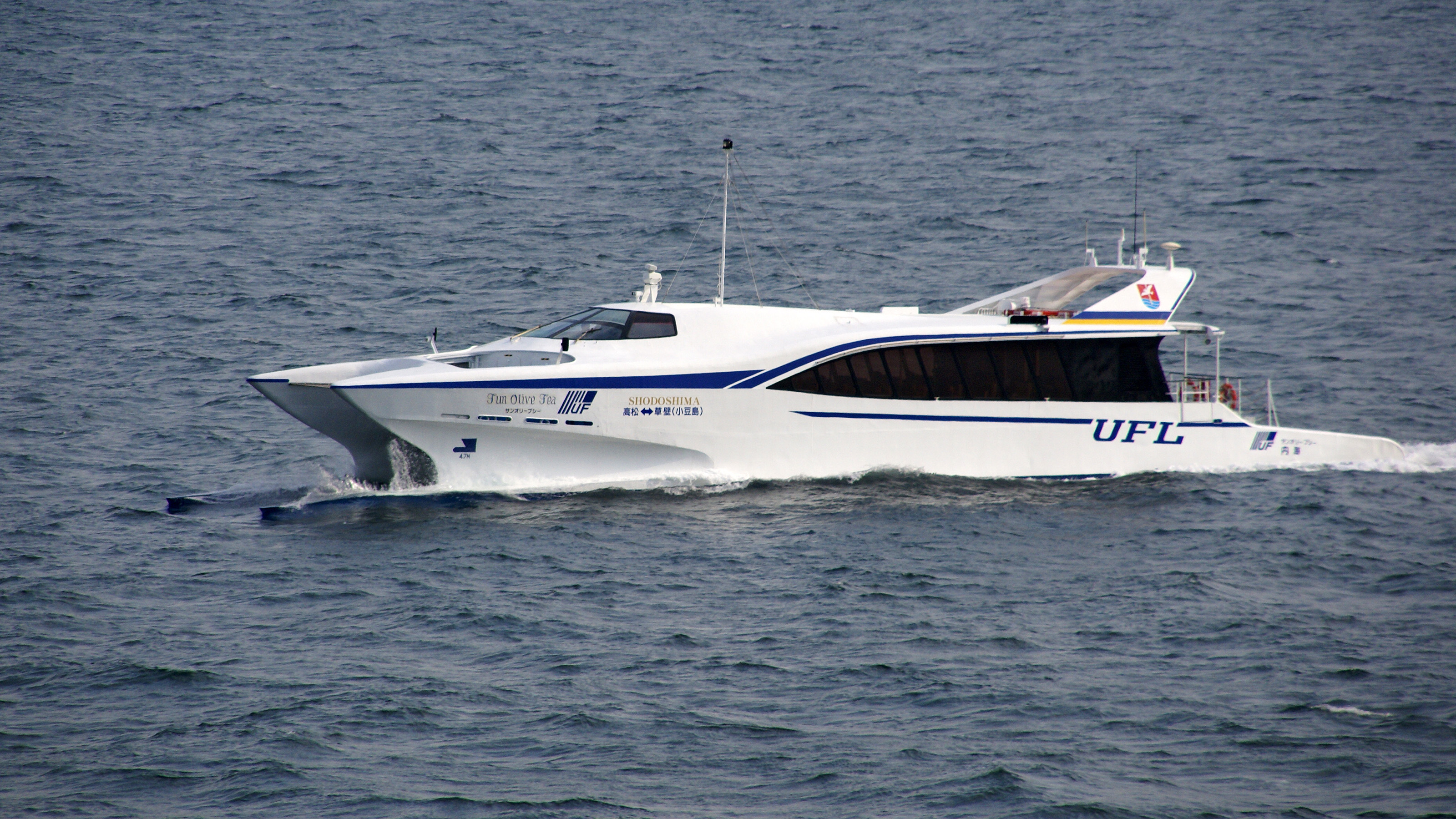 "Sun-Olive-Sea" at Takamatsu port in Takamatsu Kagawa Prefecture, Japan)